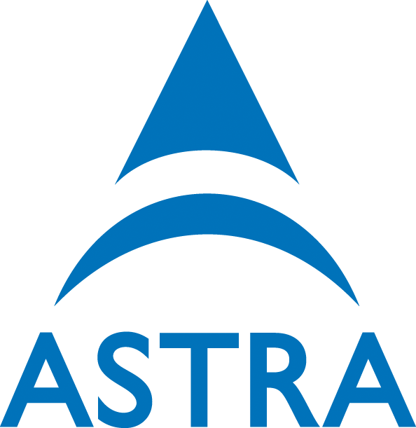 ASTRA-Logo 2014